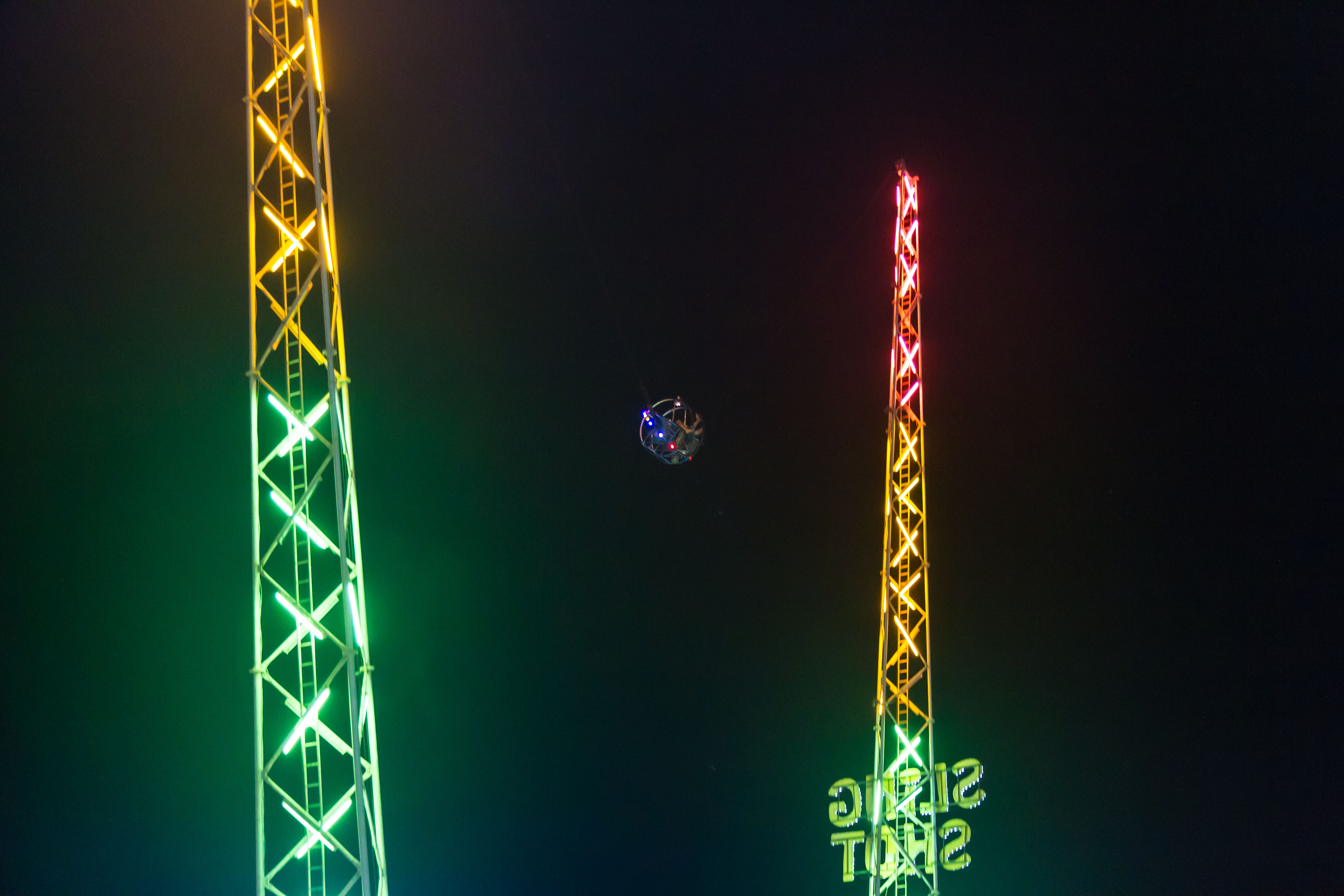 Ayia Napa, Cyprus